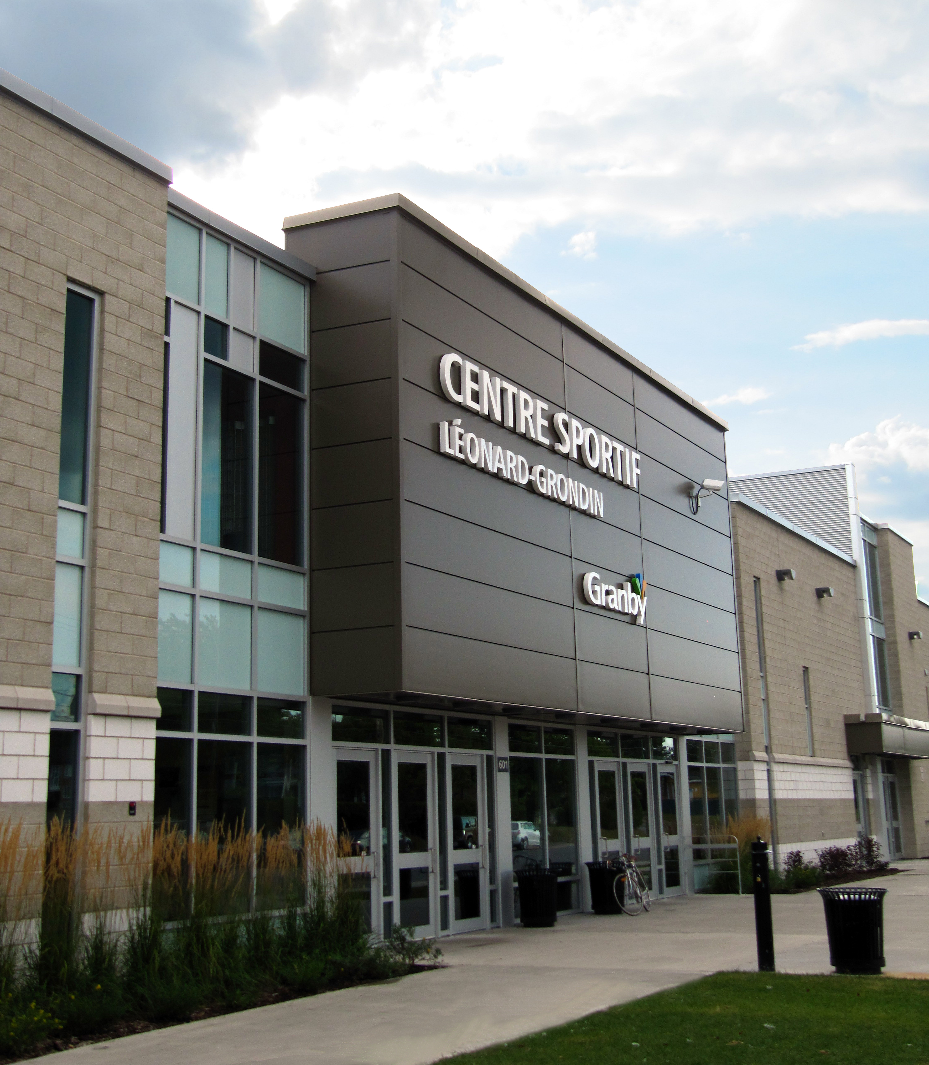 Centre sportif Léonard-Grondin (Granby, Québec) - façade